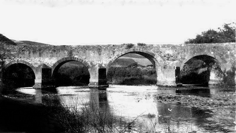 Ponte D.Maria (Odemira) antes da queda da parte central.